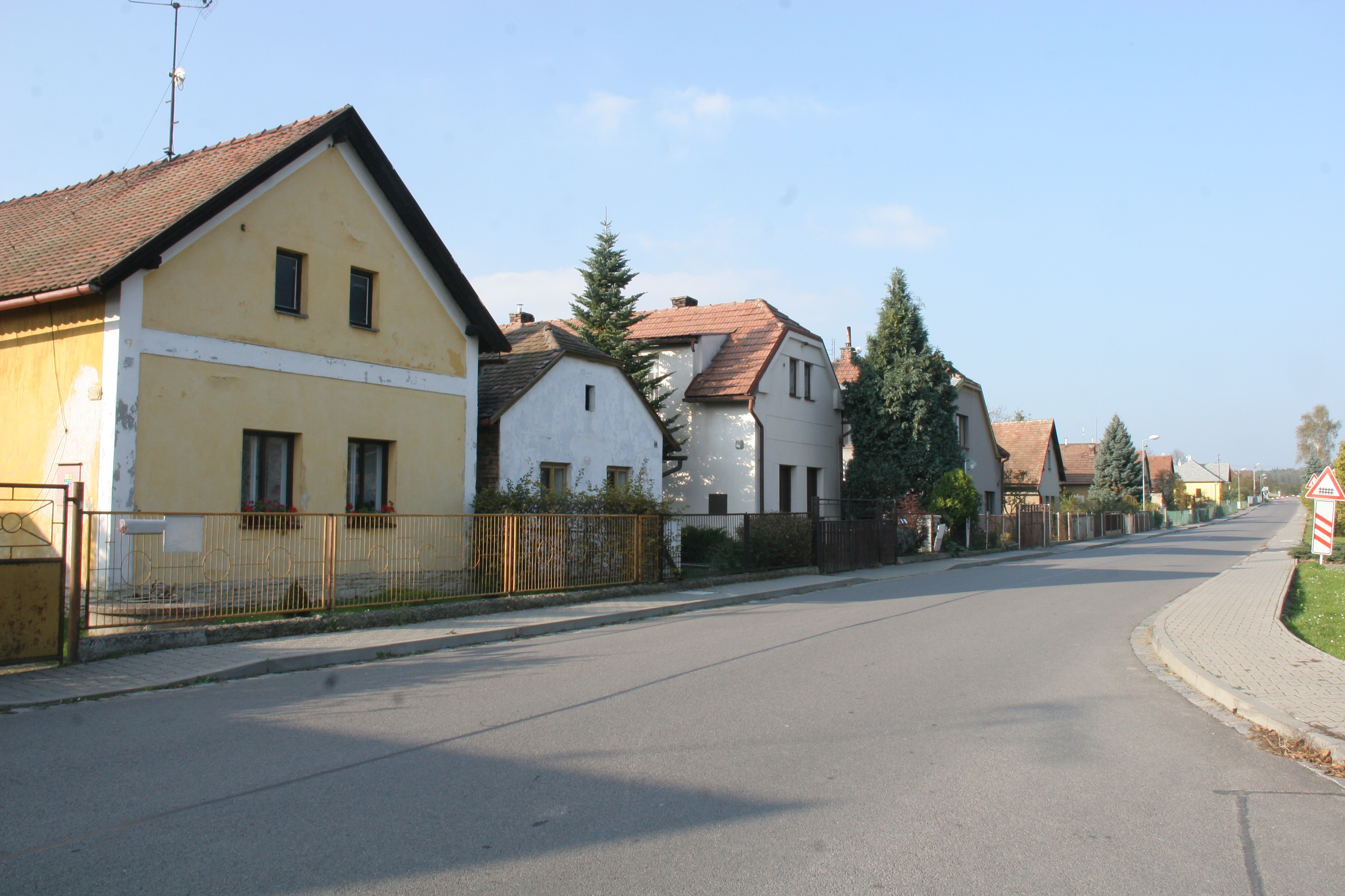 Radhošť čp. 17